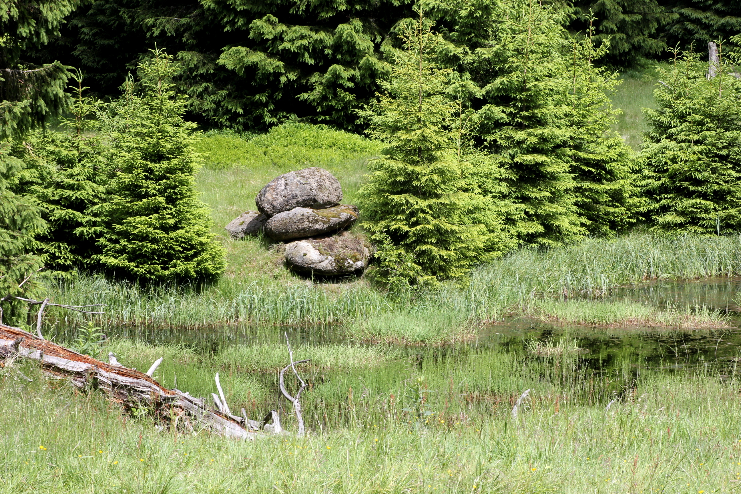 Vogelschutzgebiet Hochharz Glashüttenwiese